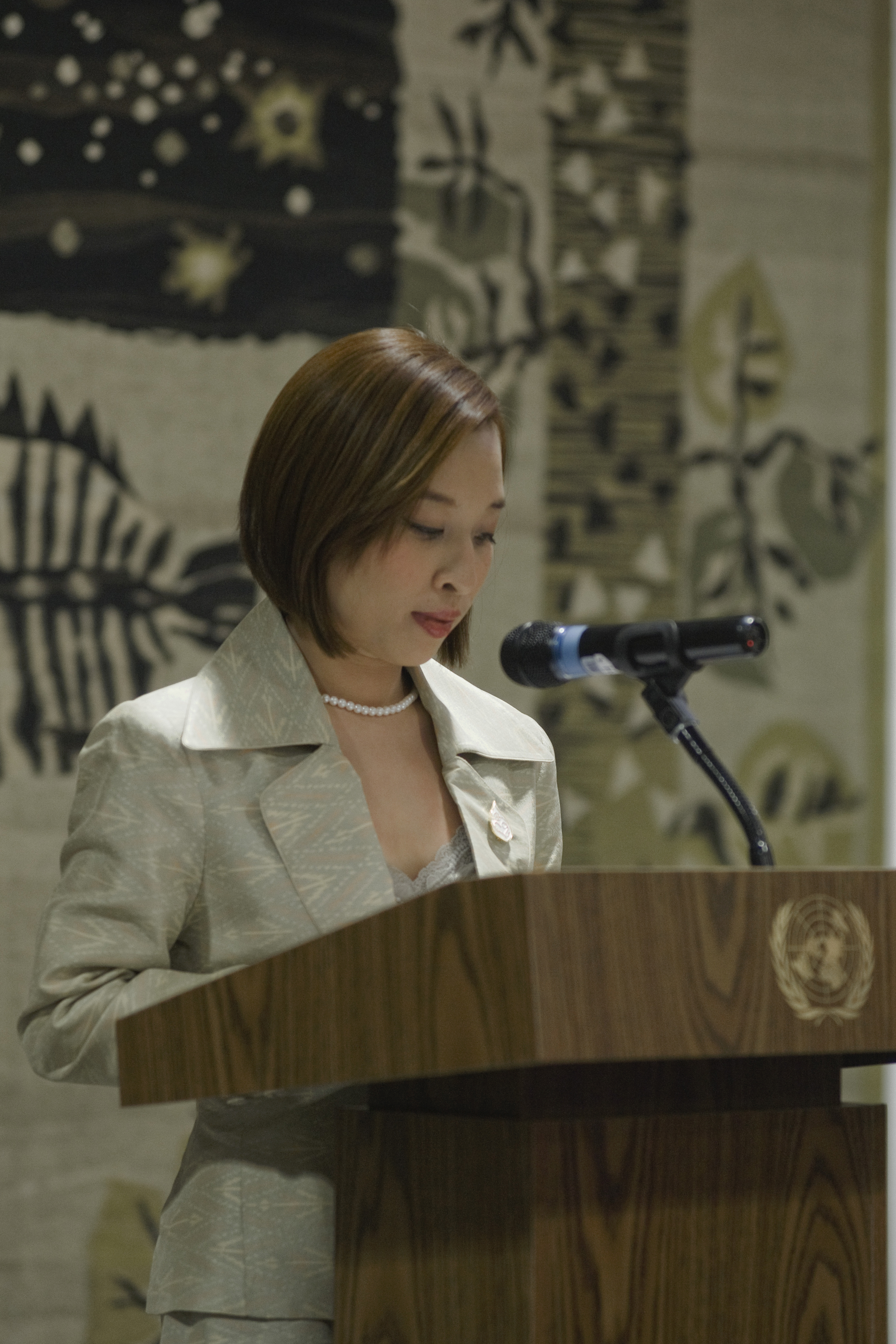 พระเจ้าหลานเธอ พระองค์เจ้าพัชรกิติยาภาเสด็จเป็นประธานในพิธีเปิดนิทรรศการโครงการ ELFI ณ สำนักงานใหญ่สหประชาชาติ นครนิวยอร์ก สหรัฐอเมริกา วันพุธ ที่ 6 ตุลาคม พ.ศ.2553 (Photographer attached to the Prime Minister of the Kingdom of Thailand : Peerapat Wimolrungkarat / พีรพัฒน์ วิมลรังครัตน์)